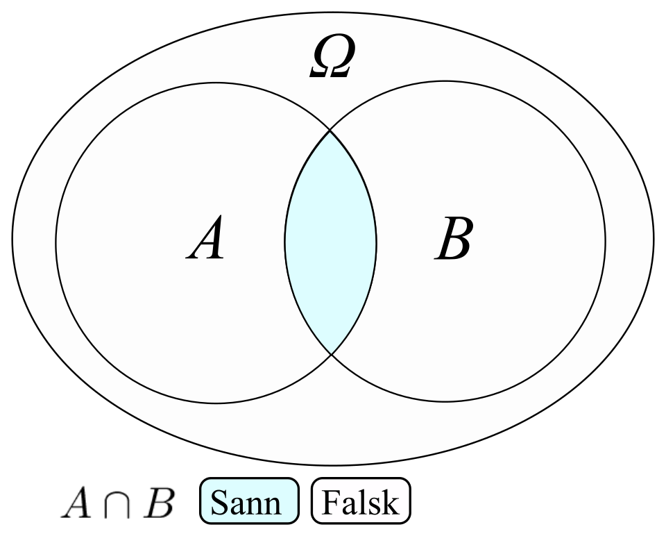 snitt